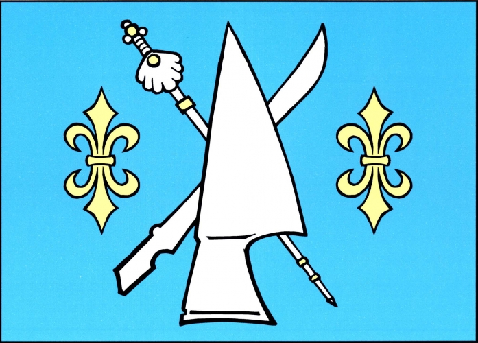 vlajka, Černín, okres Znojmo